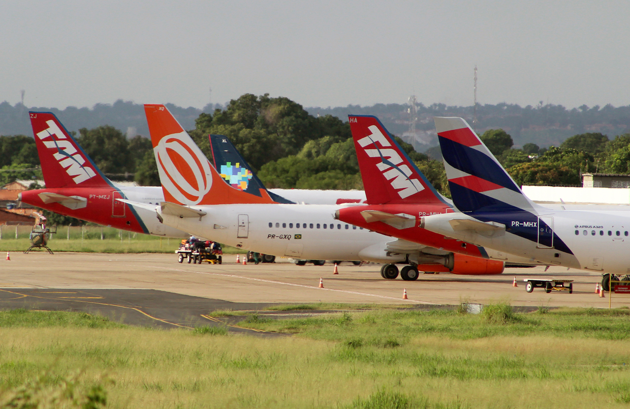 Azul Linhas Aéreas Brasileiras Embraer 195 - Airbus A320neo Gol Linhas Aéreas Boeing 737 LATAM Airlines Brasil Airbus A320 e Airbus A320neo